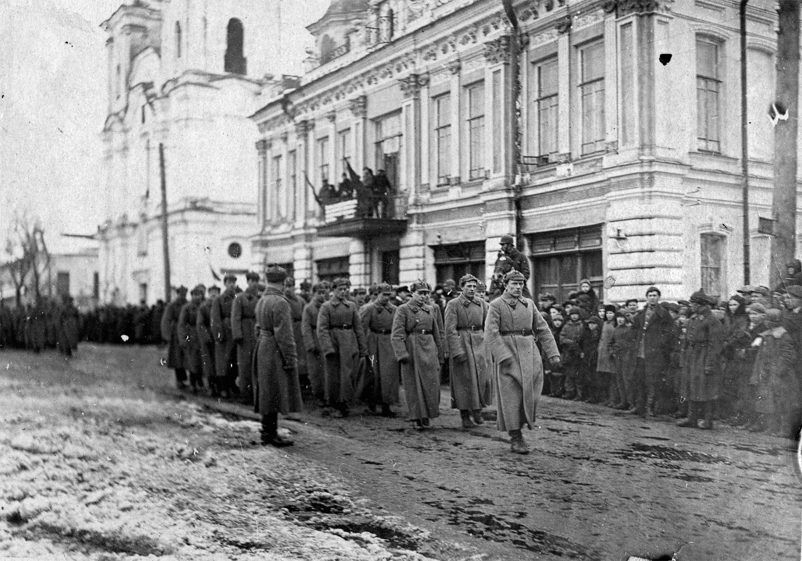 Беларуская (тарашкевіца): Магілёў (Mahiloŭ), рог пляцу Тэатральнага (plac Teatralny) і вуліцы Шклоўскай (vulica Škłoŭskaja). Касьцёл Сьвятога Францішка Ксавэрыя і Анёлаў-Ахоўнікаў і калегіюм езуітаў